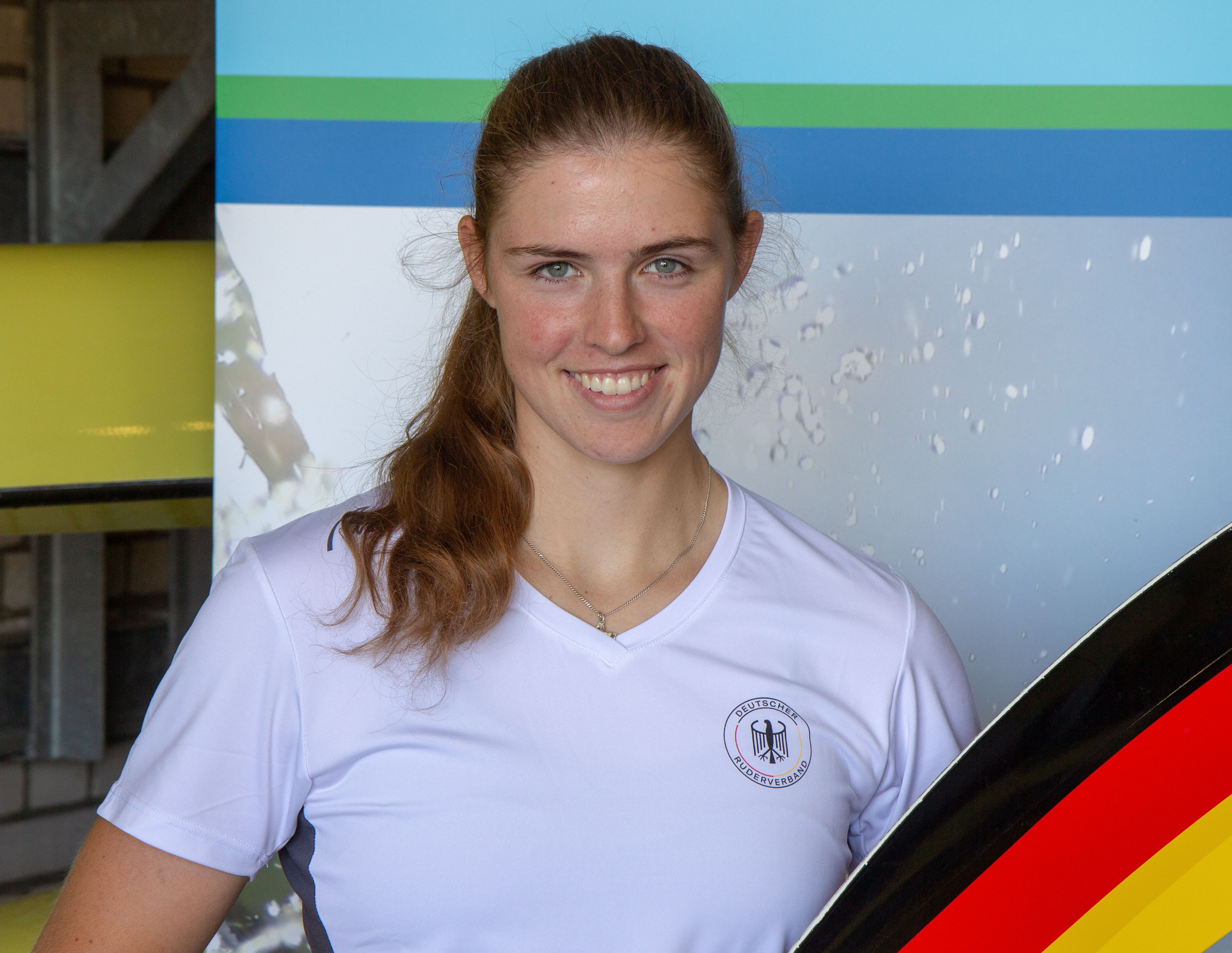 Franziska Kampmann beim Medientag des Deutschen Ruderverbandes in der Ruderakademie Ratzeburg am 22. August 2018.